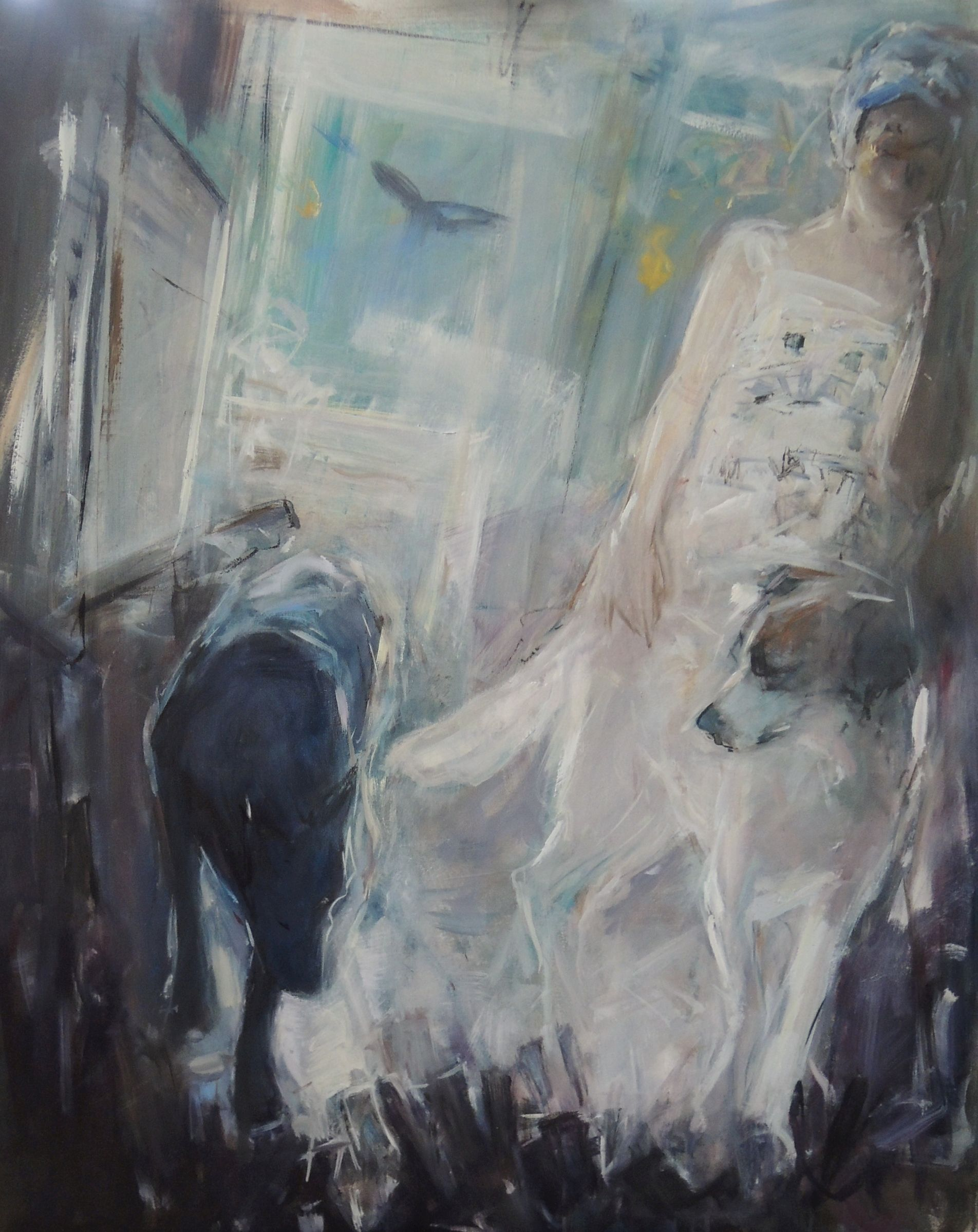 Obraz Taniec Aniołów Autor: Jadwiga Maria Jarosiewicz 100x80cm